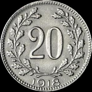 20 heller, 1918 (Austria) - reverse